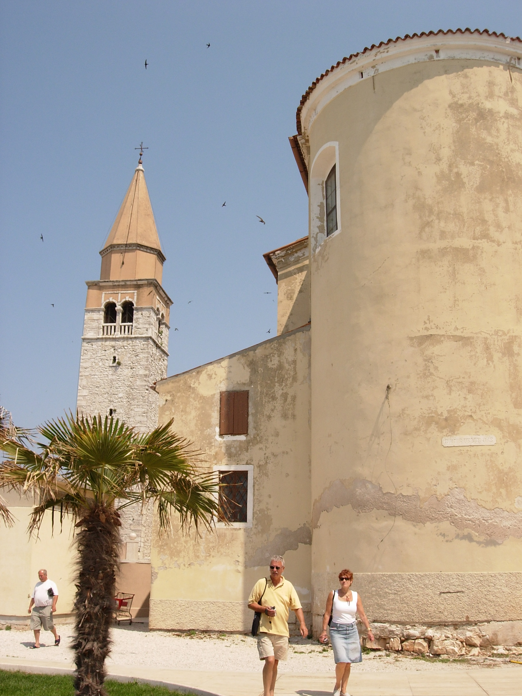 Umag